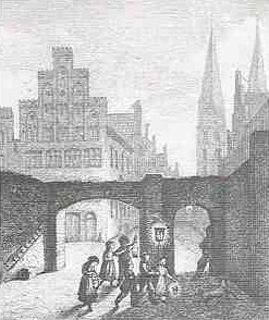 Lübecker ABC von Carl Julius Milde 1857. Cropped version.